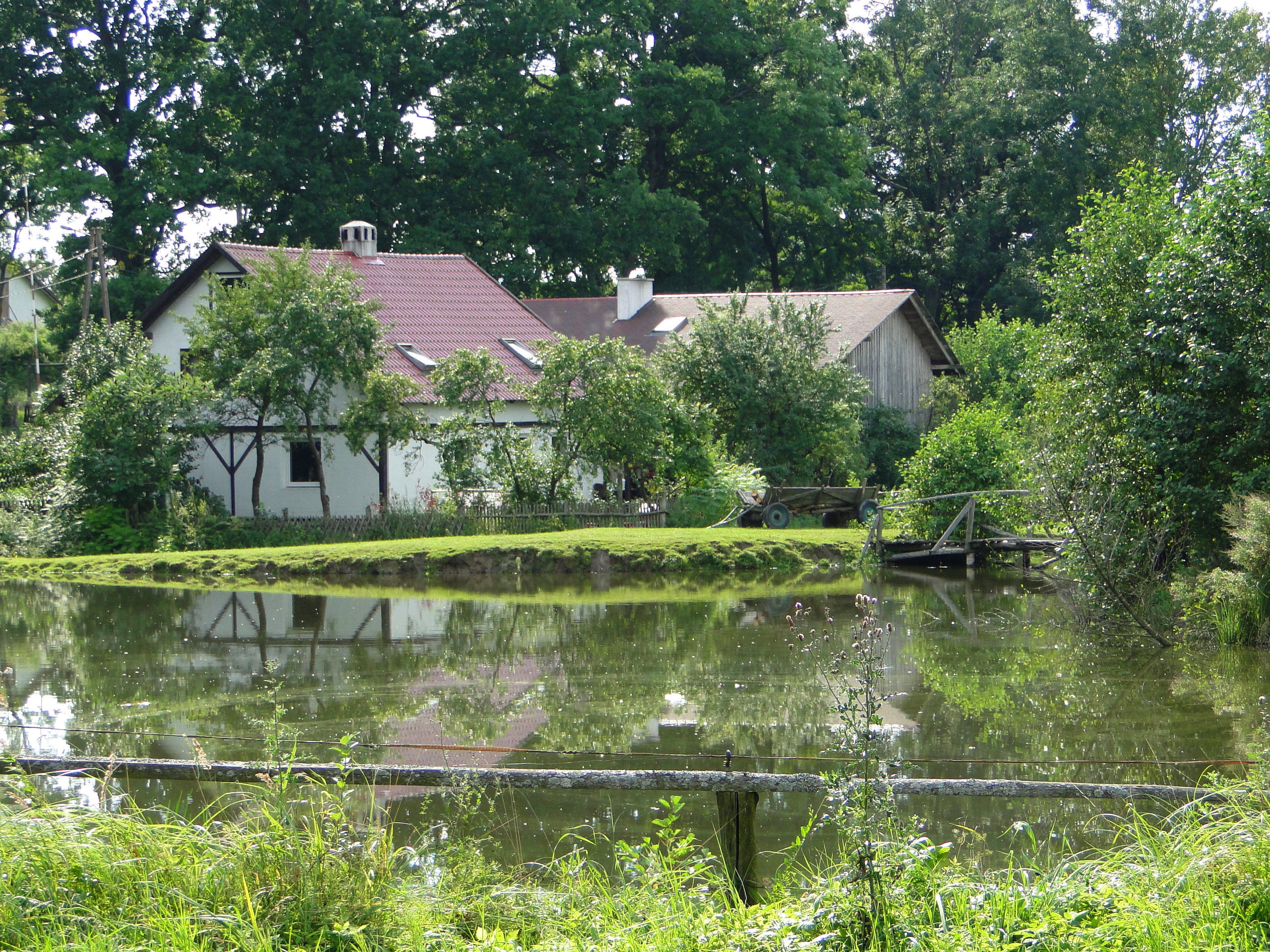 Grodzisko pruskie.